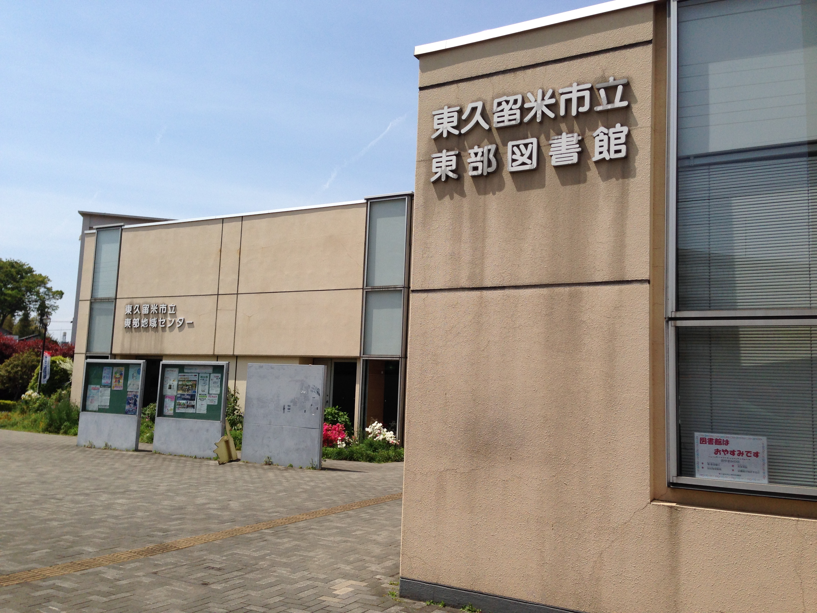 東久留米市東部地域センター内東部図書館外観（東京都東久留米市）